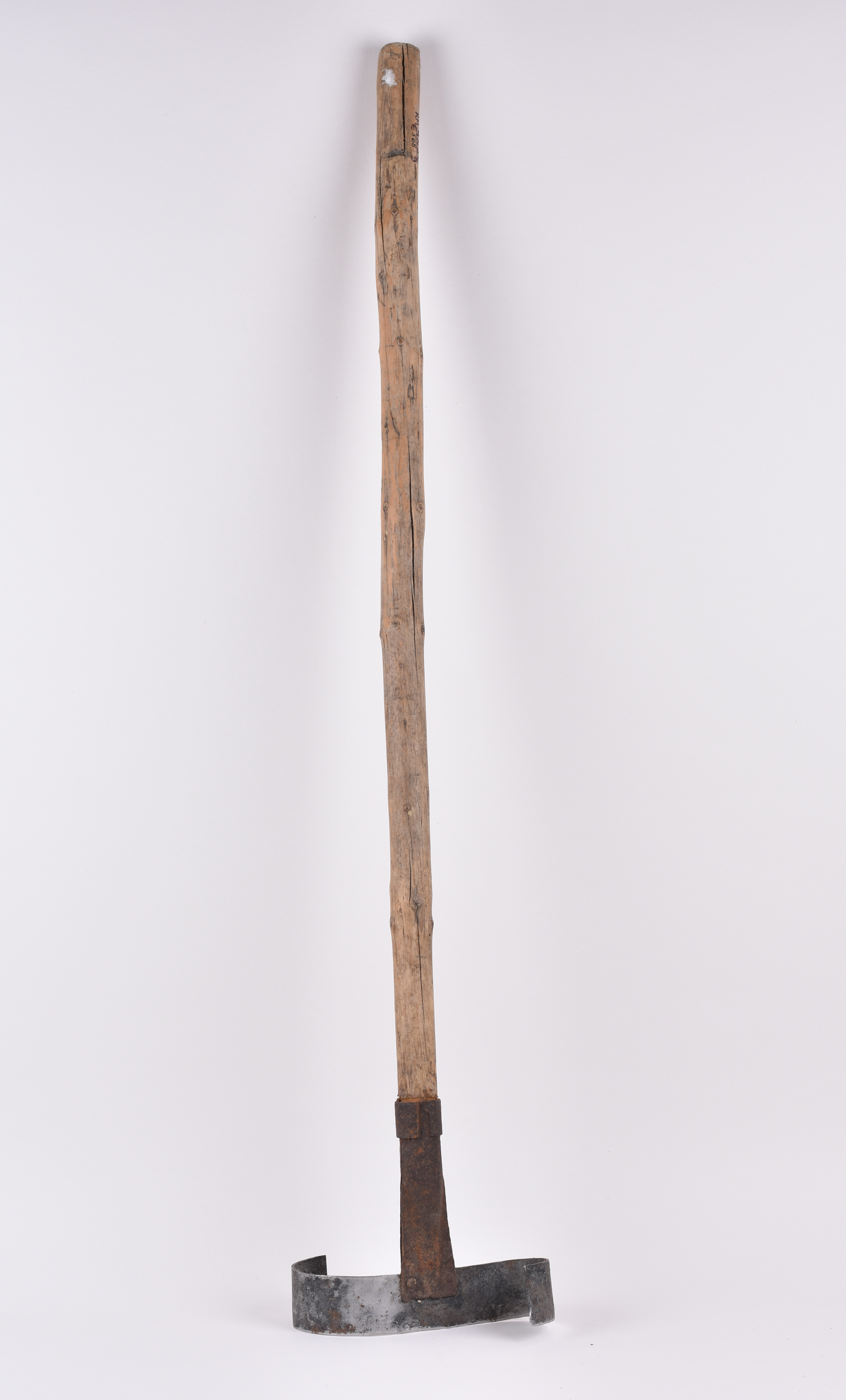 Kapsaraud, varrega Kapsaraud S-kujulise rauaga, puust varrega, metallist rooga, roog ja tera eri osadest kokku pandud, tera roo külge needitud. Valmistamise kohta andmed puuduvad, ilmselt 19. saj lõpp või 20. saj algus; Eesti Lahu Raud kapsaste kui ka kartulite purustamiseks, kasutatud Väinjärve vallas, Lahu külas Vidriko talus.; Eesti Lahu